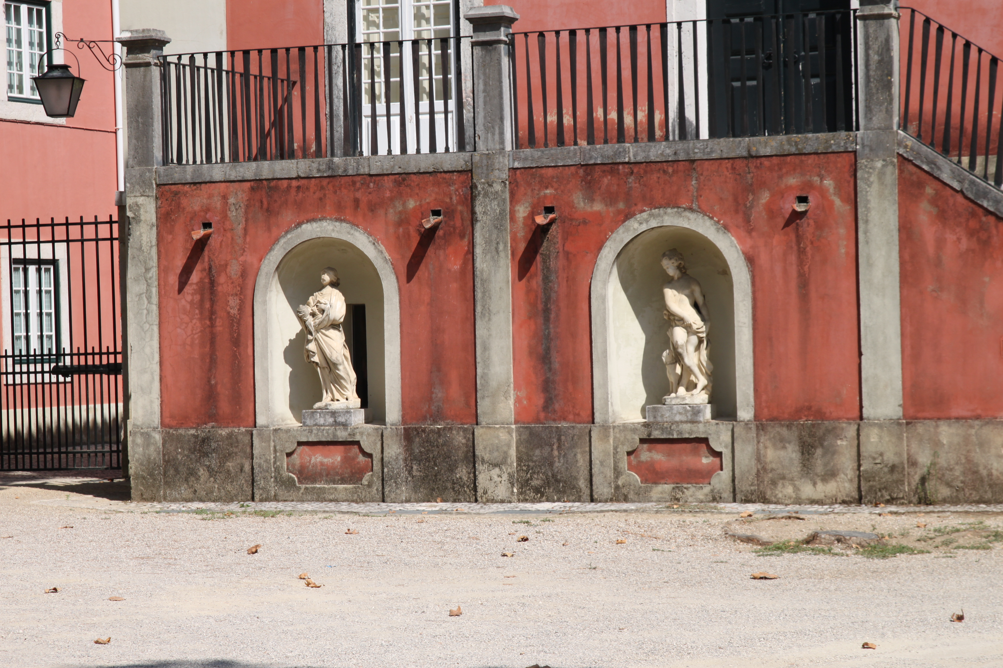 Quinta dos Lagares d'El-Rei This file was uploaded for Wiki Loves Monuments in Portugal with the unique identifier 75032.